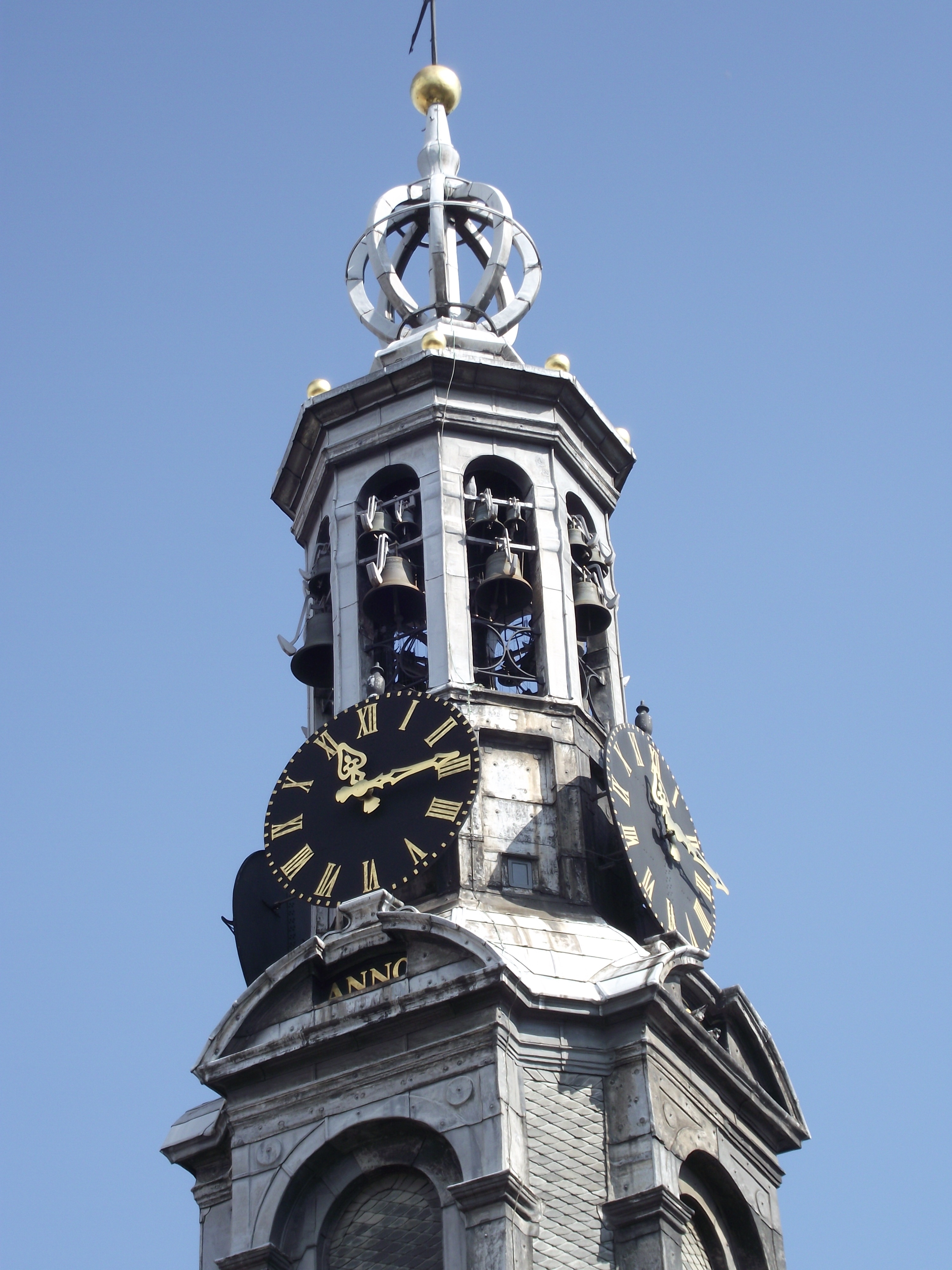 Amsterdam, Munttoren, H.de Keyser, XIV eeuw - 1620